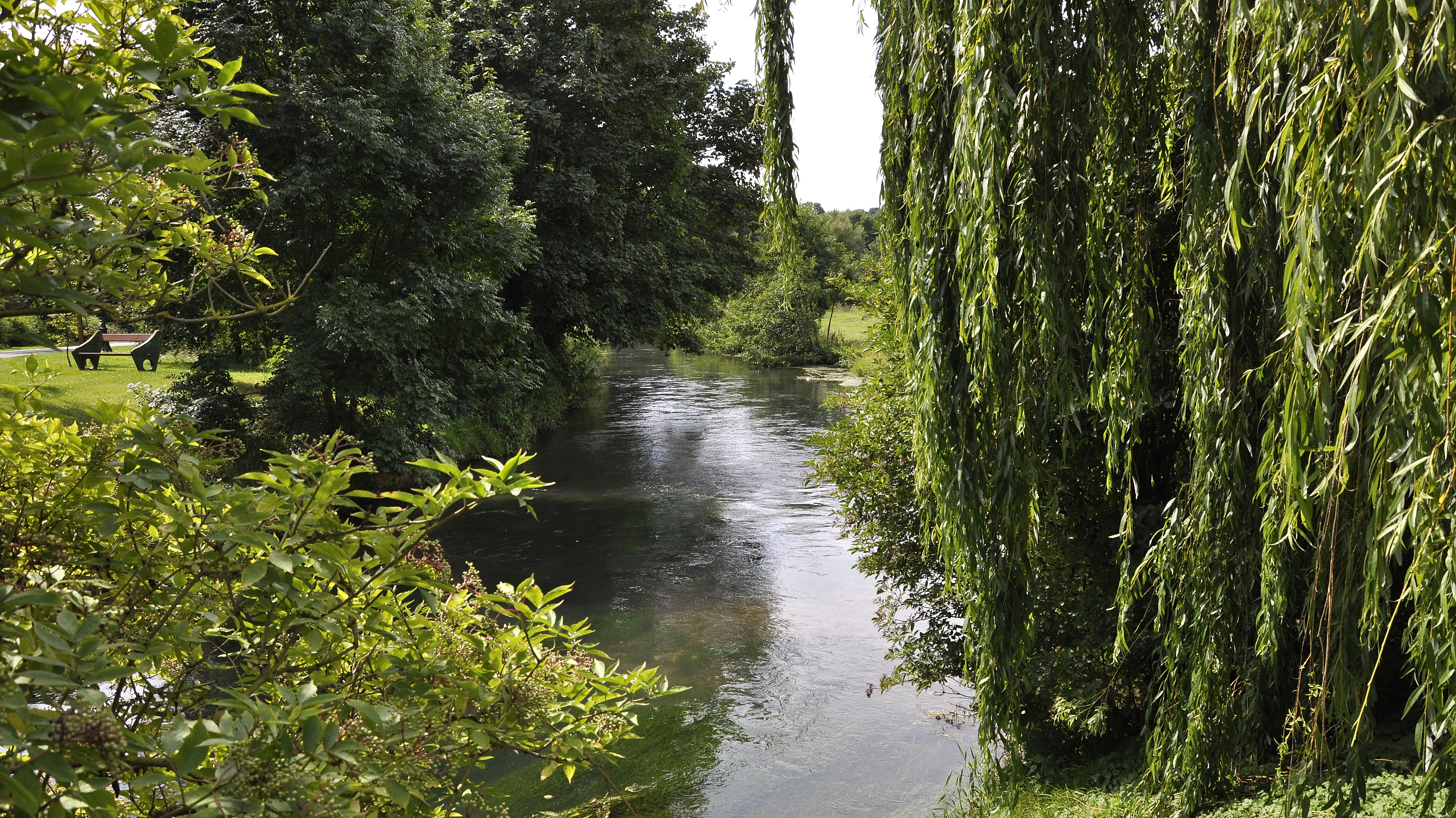 De Saâne, een rivier in Longueil, Frankrijk